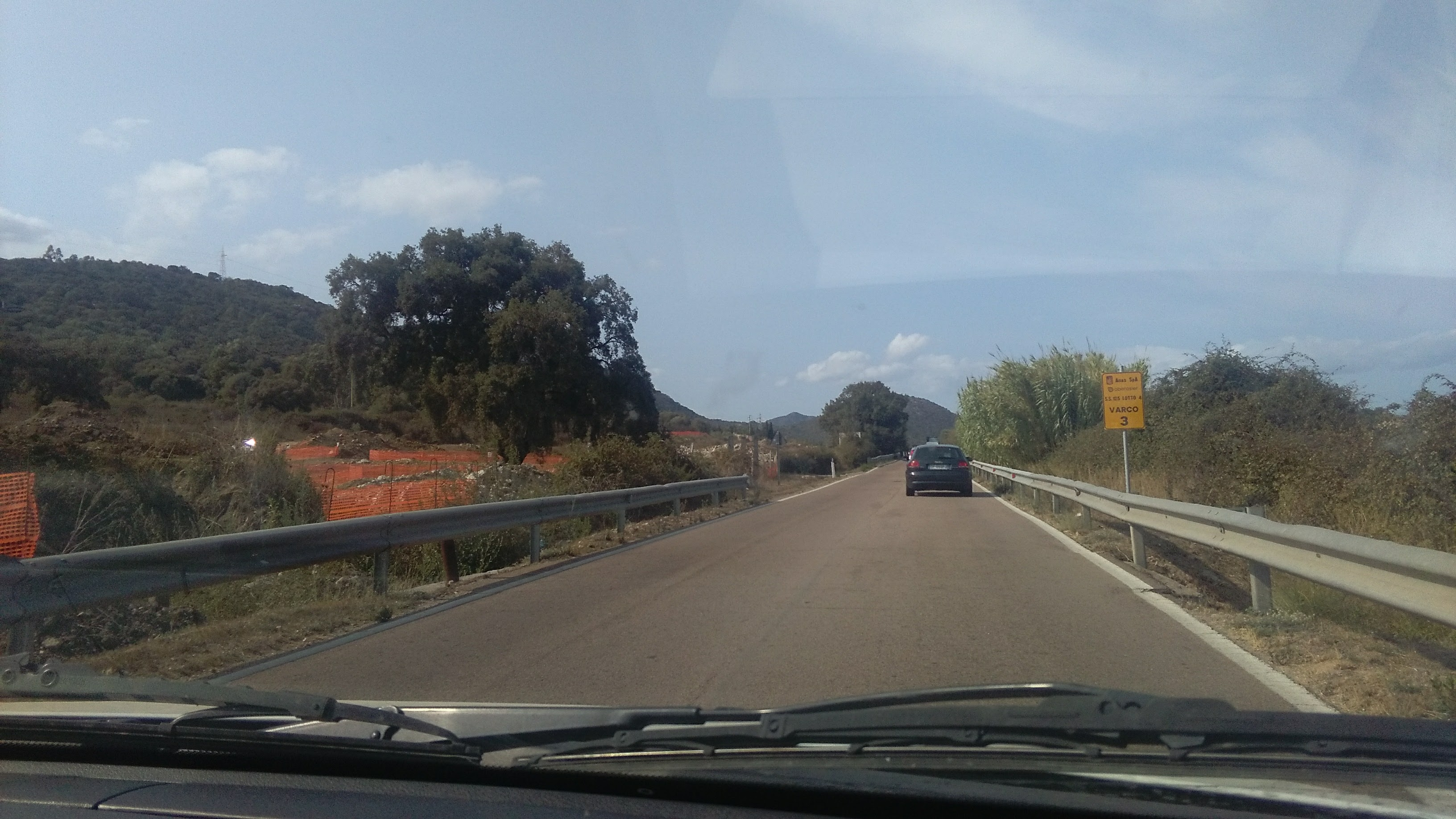 Sulla destra la vecchia SS125, sulla sinistra il cantiere della SS125var